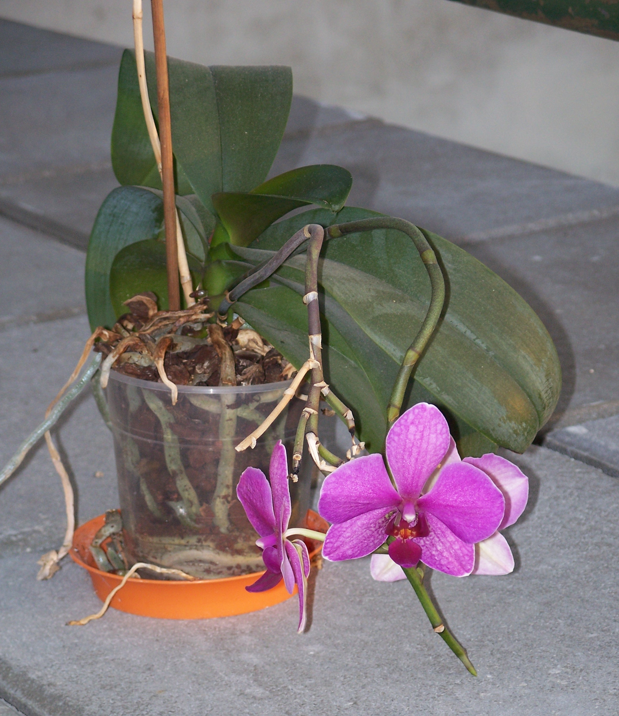 Celkový habitus rostliny